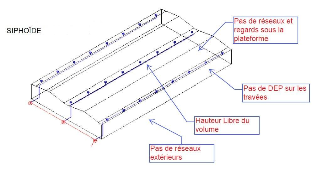 Illustration du fonctionnement d'un système siphoïde.